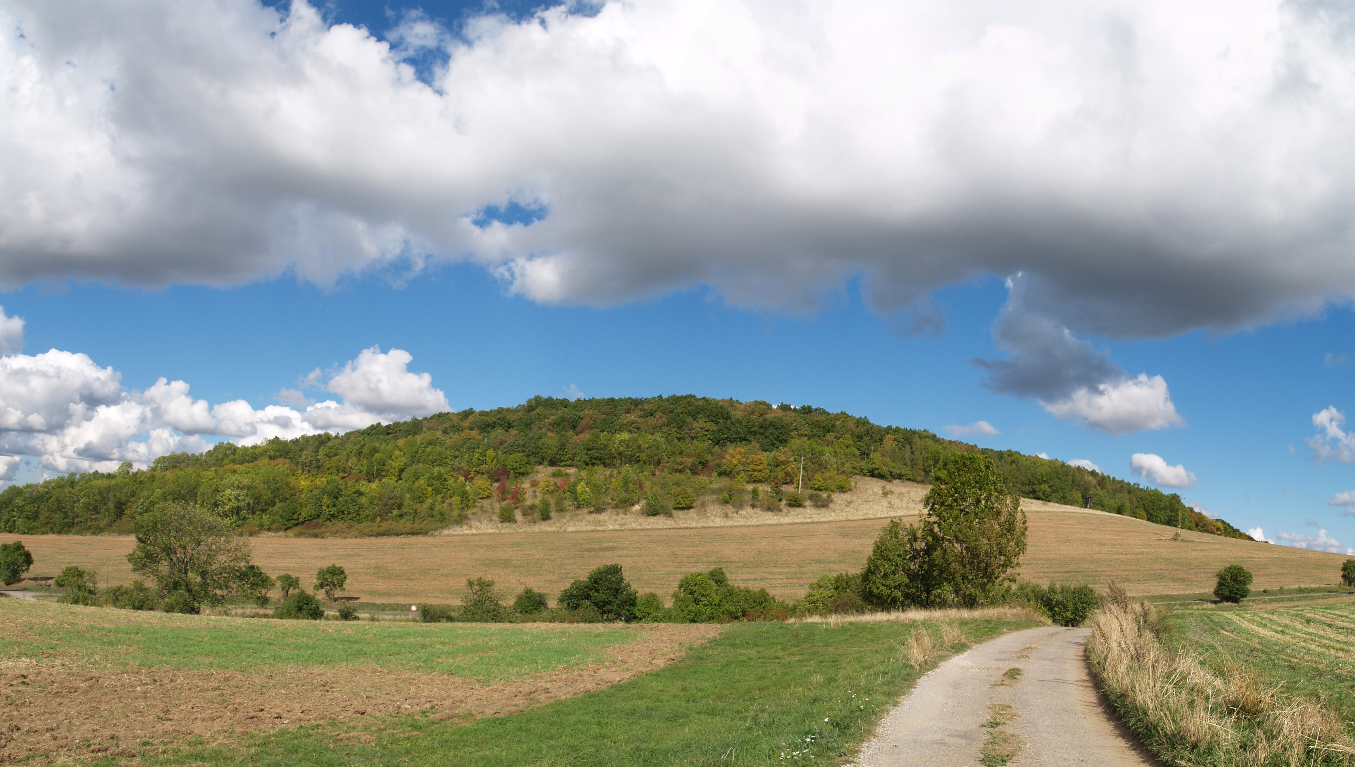 Pohled na Bacín z jihovýchodu.